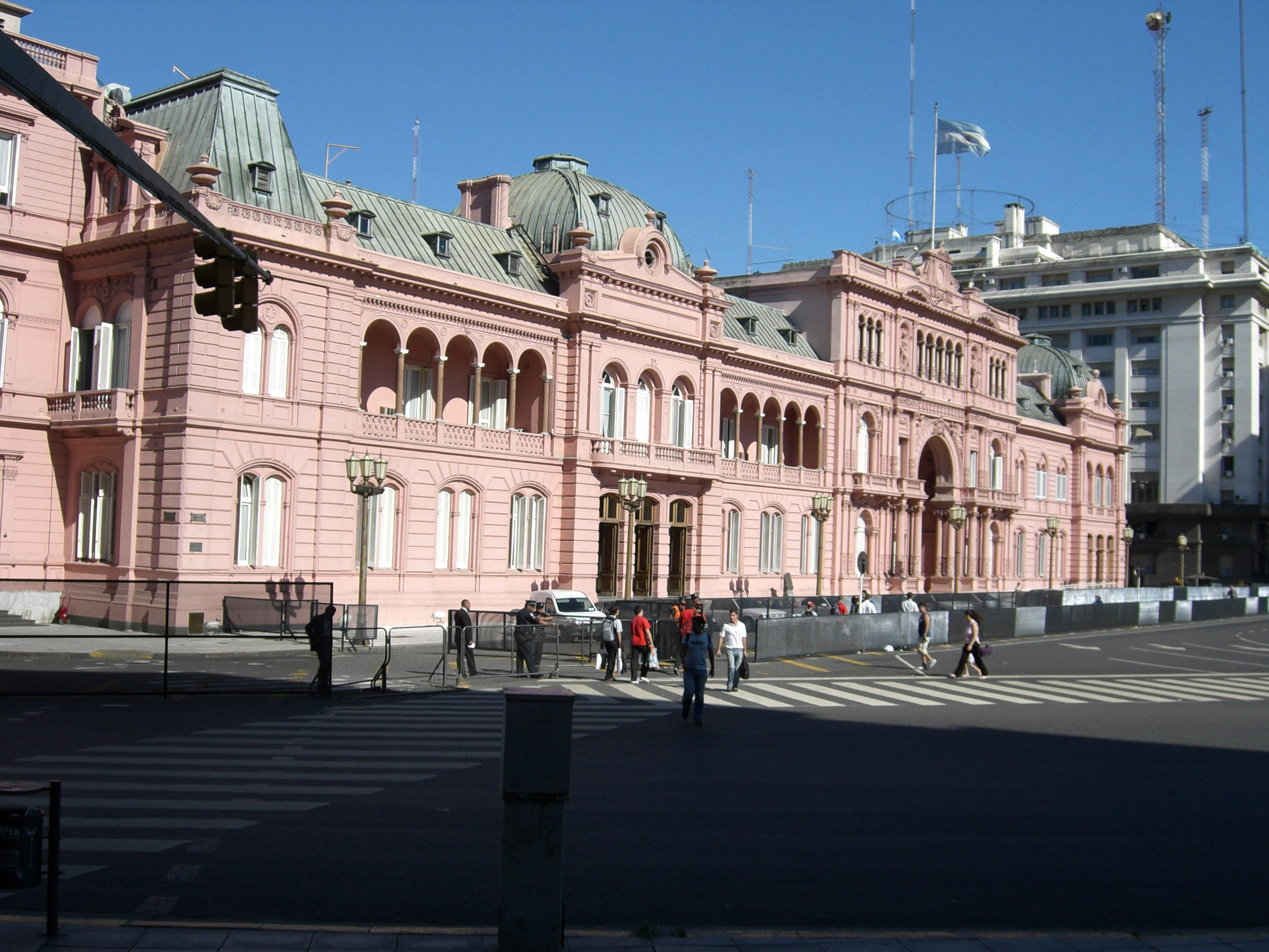 Casa Rosada, Buenos Aires, Argentina